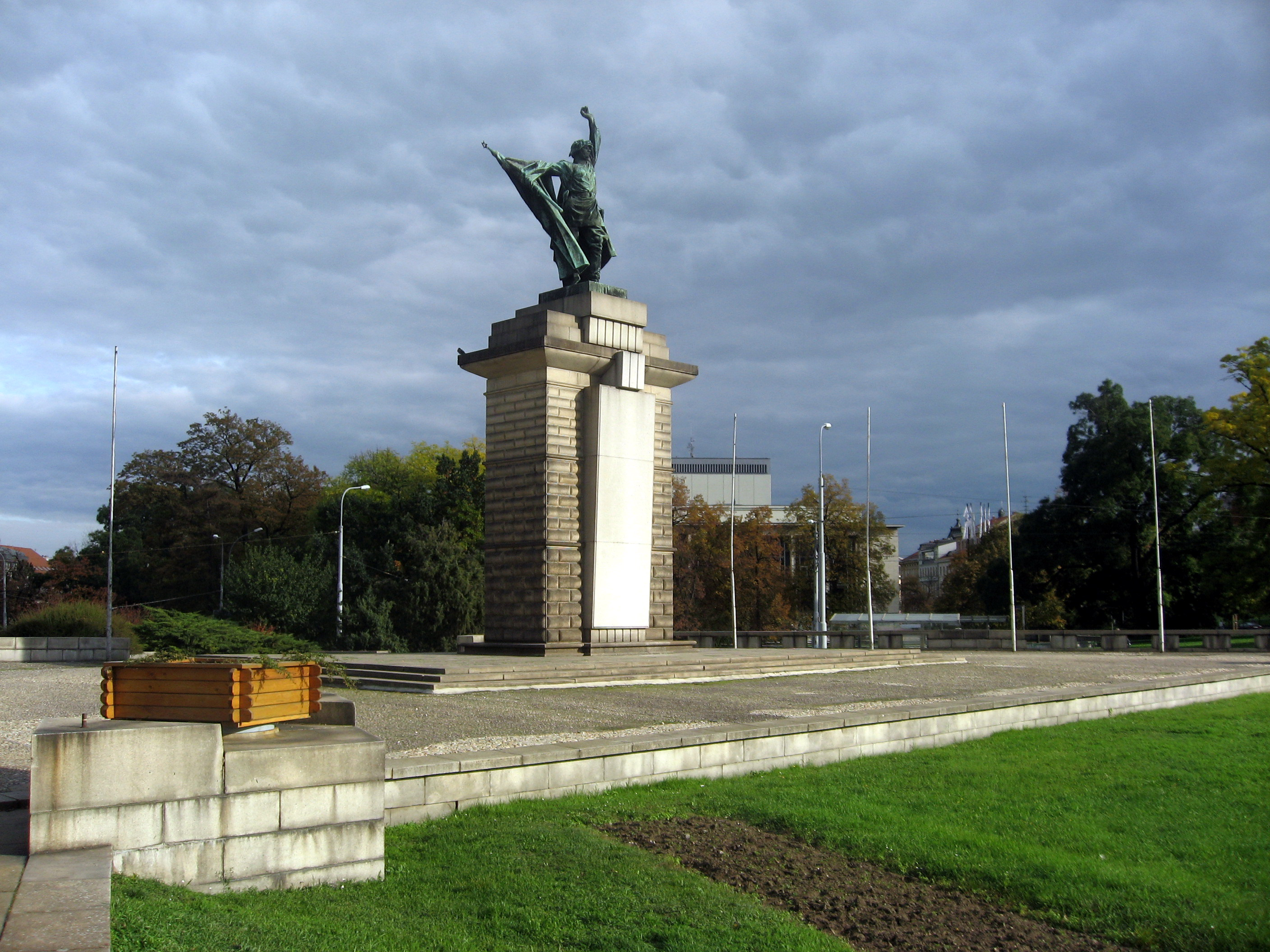 Brno, Moravské náměstí